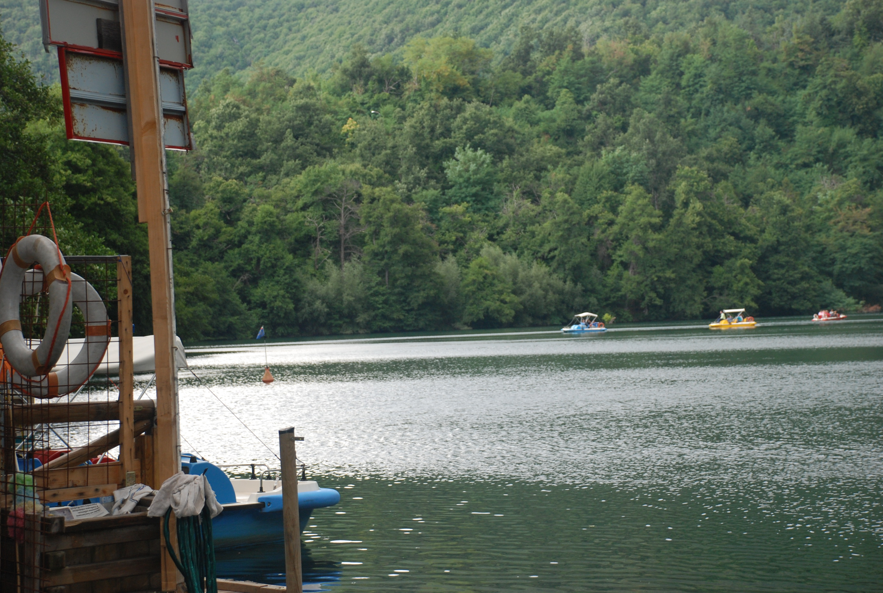 Panoramica di Monticchio laghi, Basilicata